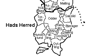 Kort over Hads Herred, Århus Amt